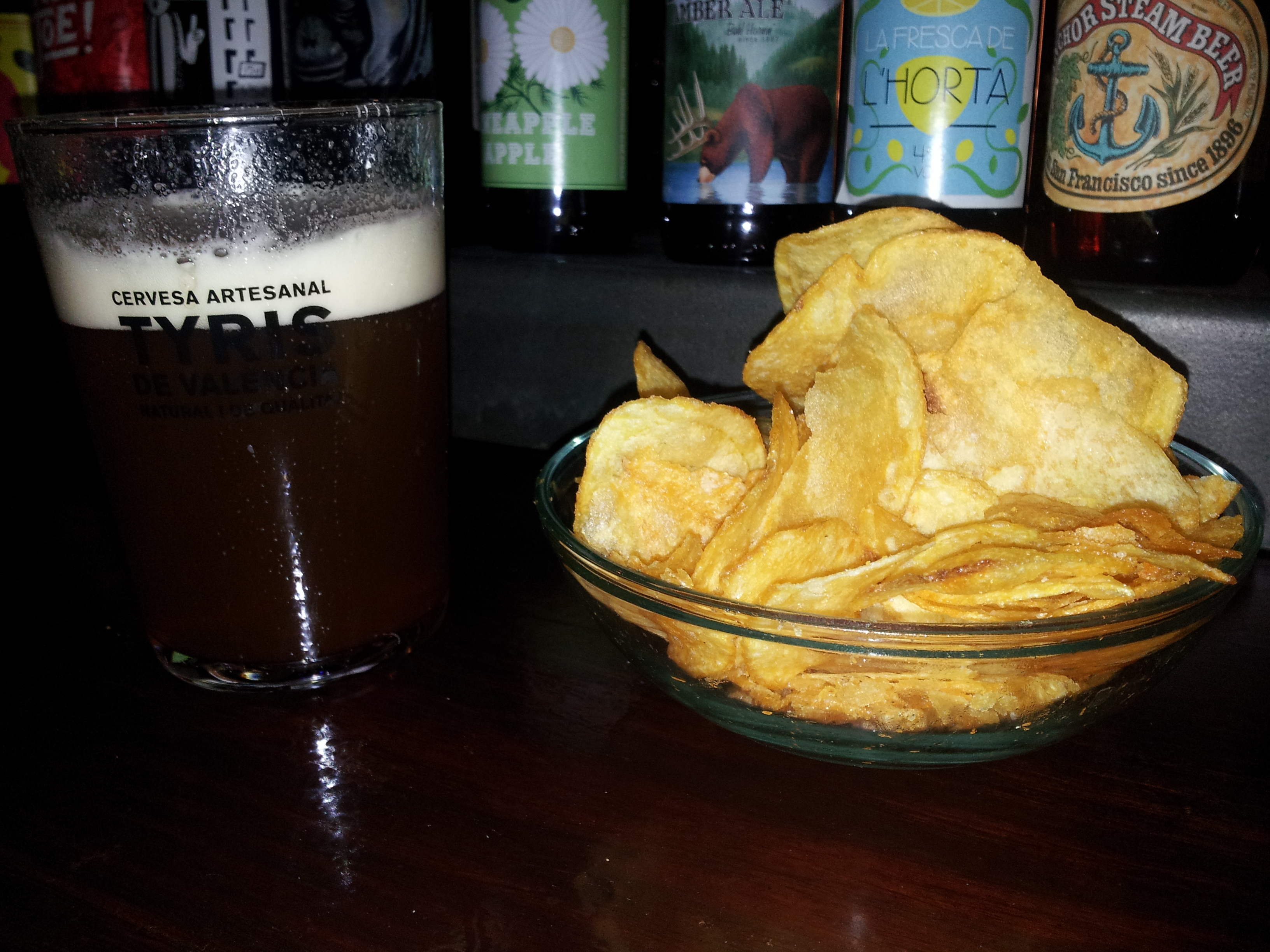 Got de Paqui Brown amb creïlles fregides.